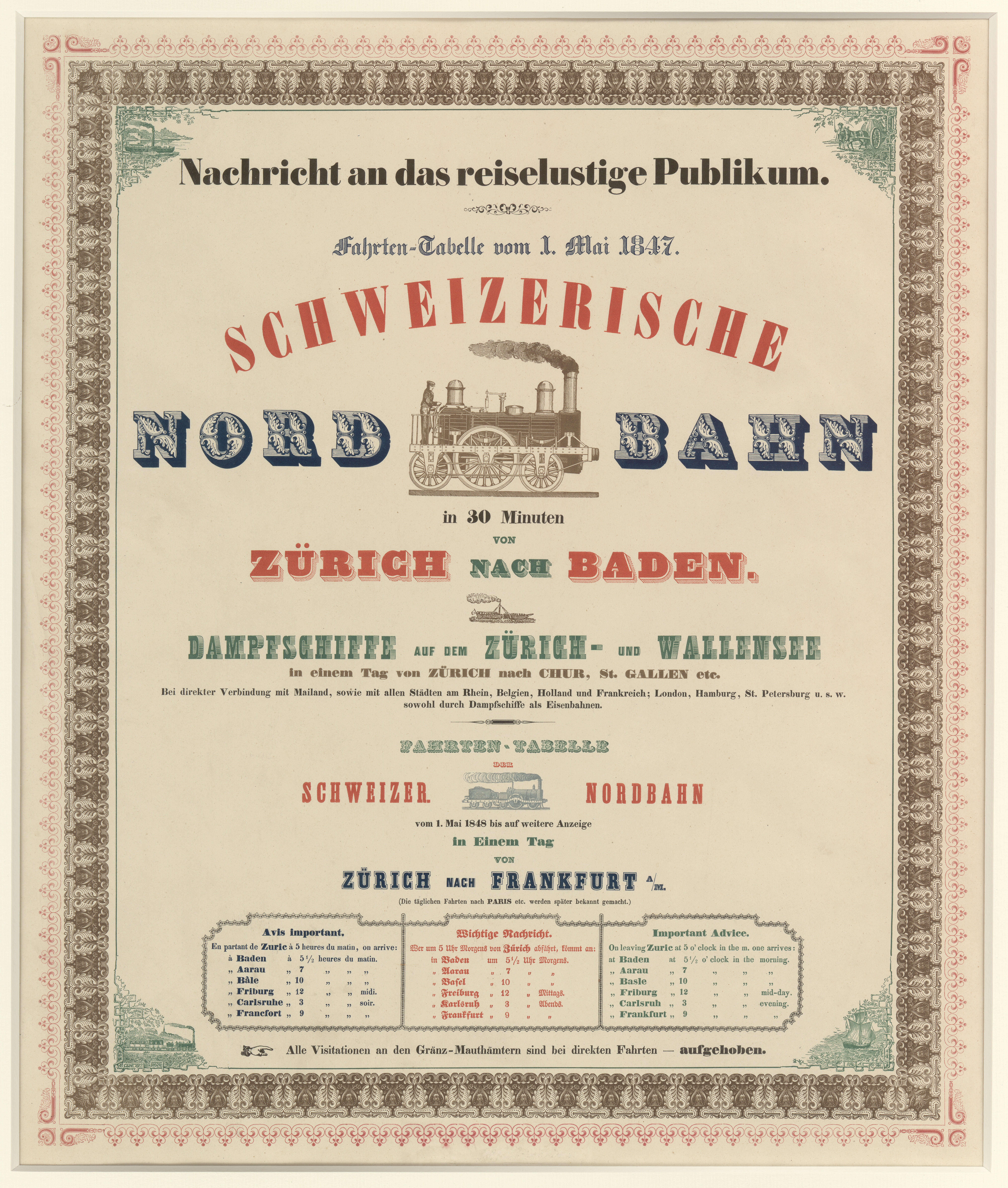 Nachricht an das reiselustige Publikum